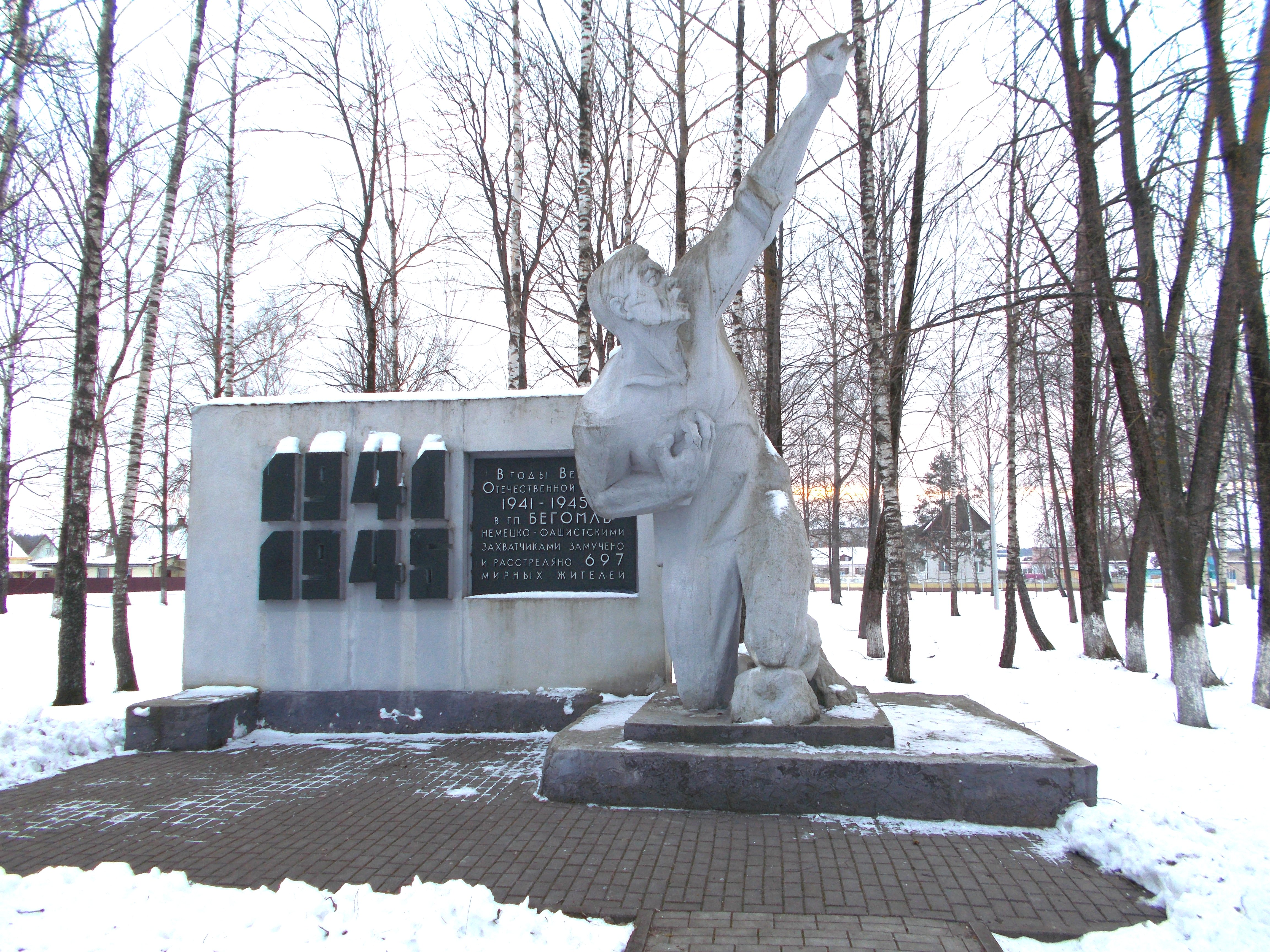 Памятник на месте убийства 697 евреев Бегомльского гетто. Находится в Бегомле на улице Советской слева от Дома культуры между Домом культуры и Советским переулком..